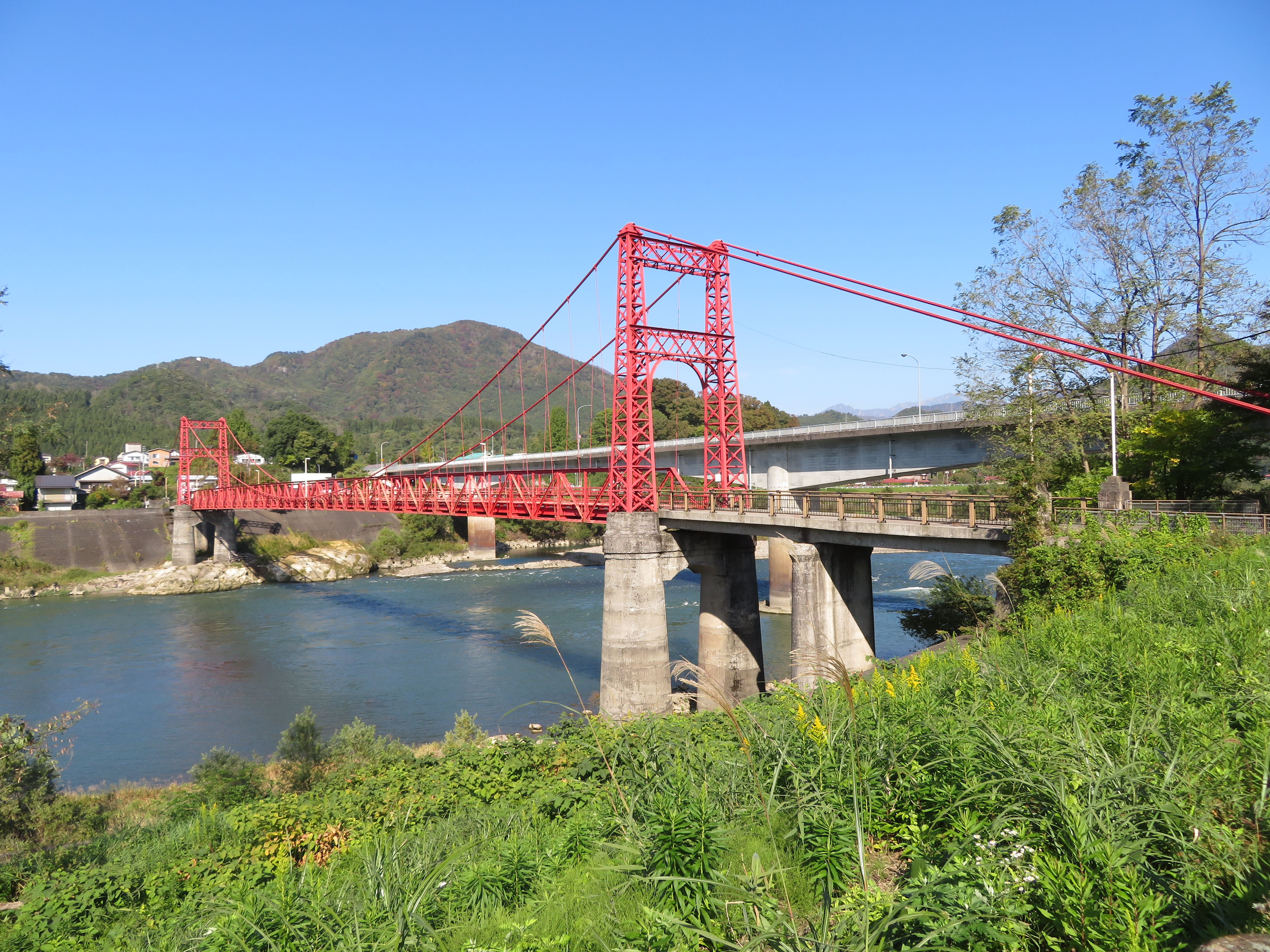 鹿瀬橋（鹿瀬支所側から撮影） Canon PowerShot SX720 HS